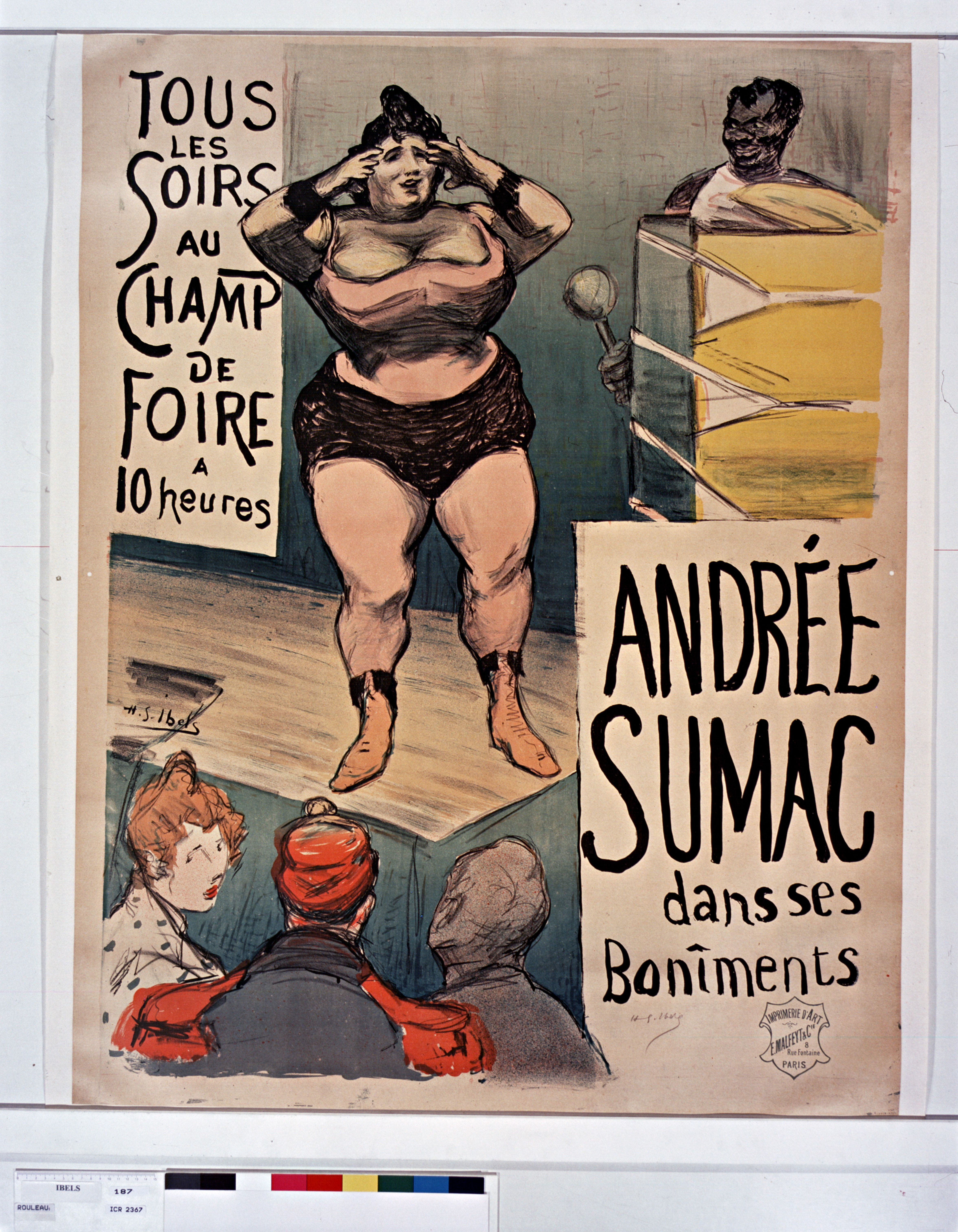 ... Champ de foire... Andrée Sumac dans ses boniments